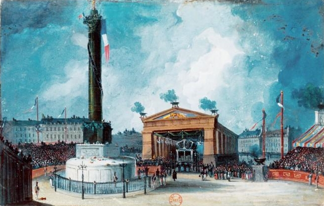 Inauguration de la colonne de Juillet en juillet 1840. Gouache, 13,8 x 21,7 cm, en provenance de la collection Hippolyte Destailleur.